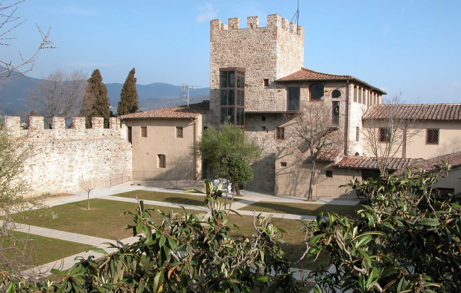 il giardino